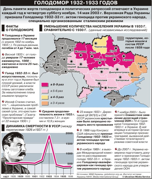 Инфографика "Голодомор 1932-1933 гг. на Украине"